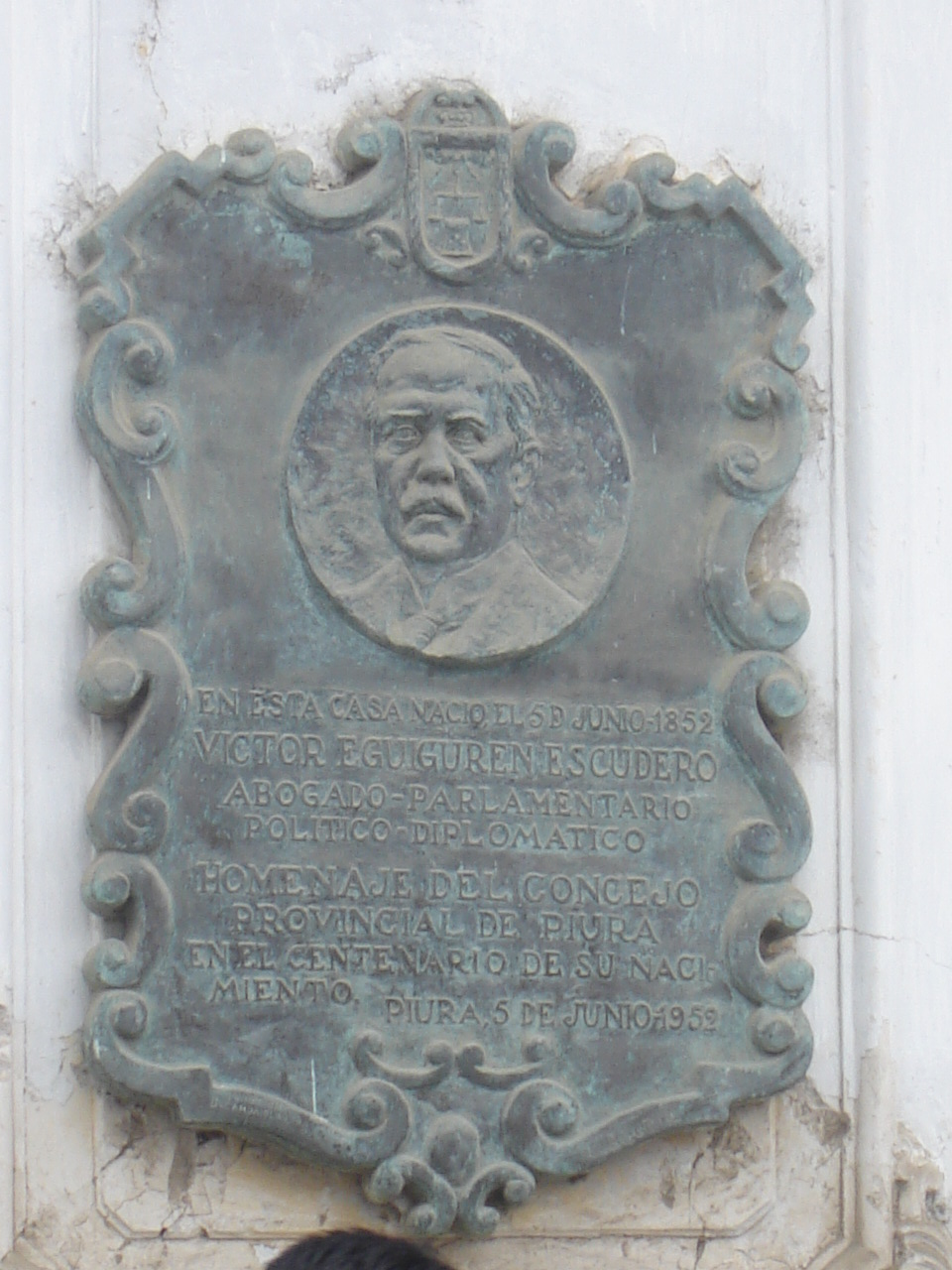 Placa frente a antigua casona Eguiguren en Piura